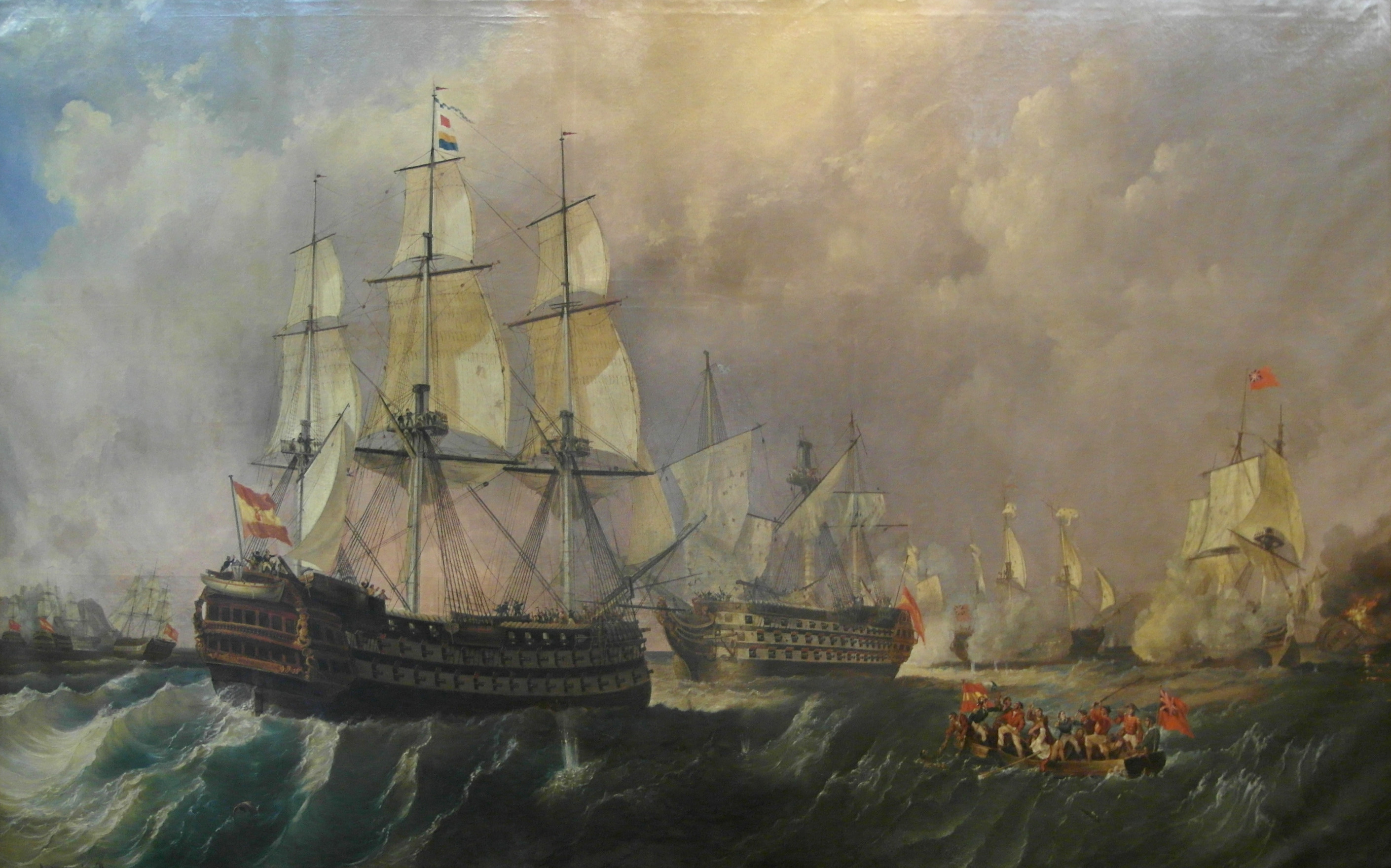 El lienzo representa al navío español Pelayo acudiendo en auxilio del navío de cuatro puentes Santísima Trinidad durante la batalla del Cabo de San Vicente, que se libró el 14 de febrero de 1797 y supuso una grave derrota para la Armada Española, que perdió cuatro navíos de línea a manos de la flota británica.